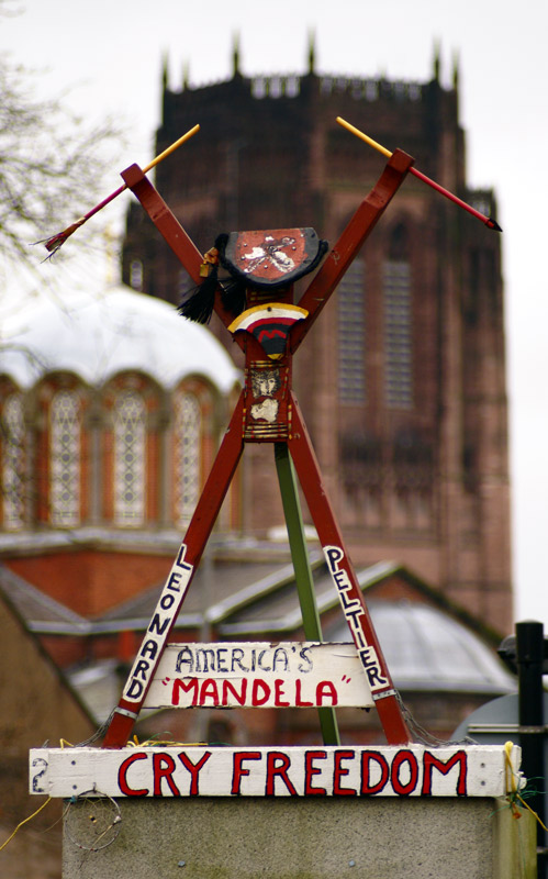 Une scultpure pour la libération de Leonard Peltier à Liverpool, Royaume-Uni